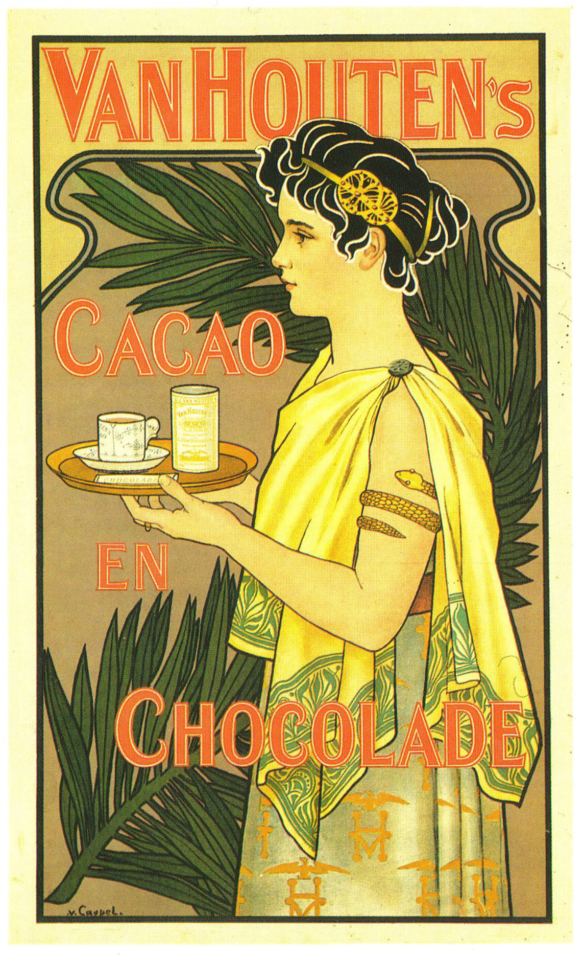 Affiche. "Van Houten's Cacao en Chocolade".